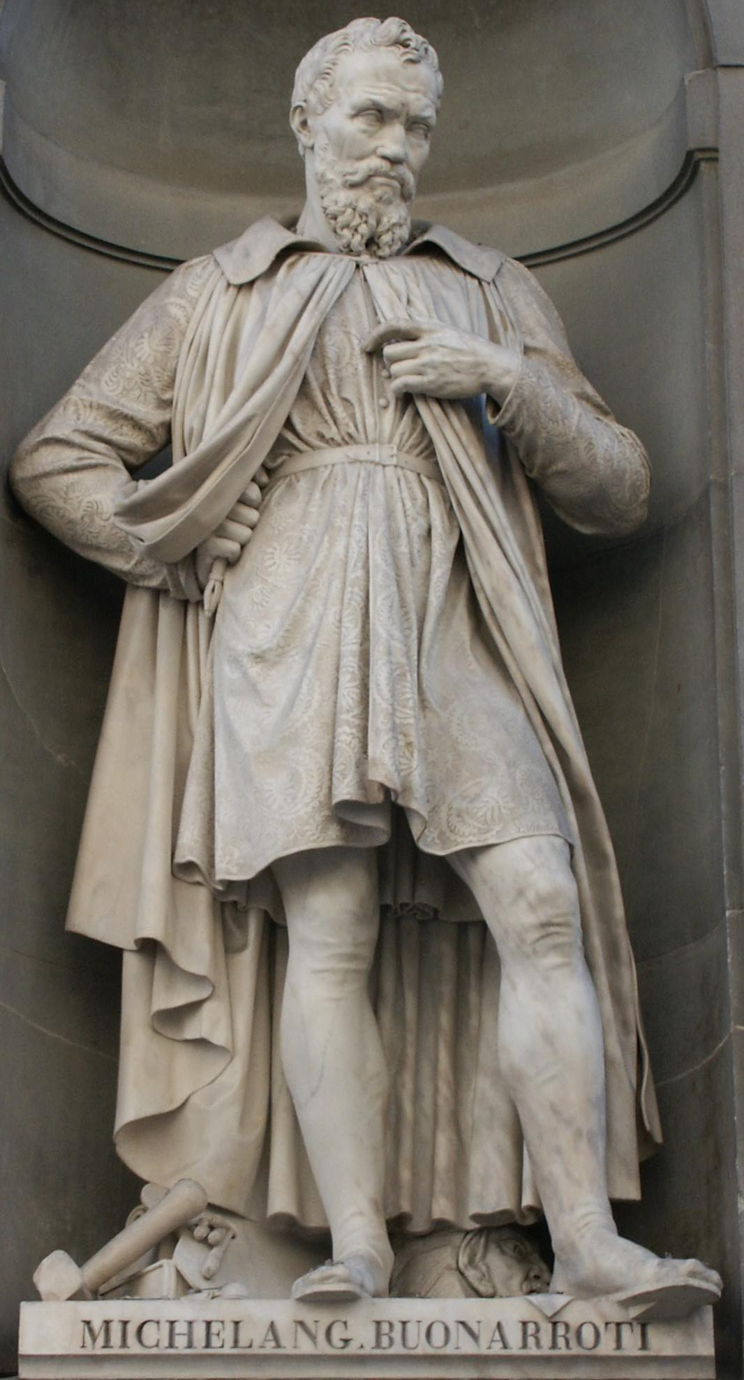 Statua di Michelangelo, sita a Firenze presso la Galleria degli Uffizi. Fotografata da Frieda (dillo a Ubi) il 18 settembre 2004.